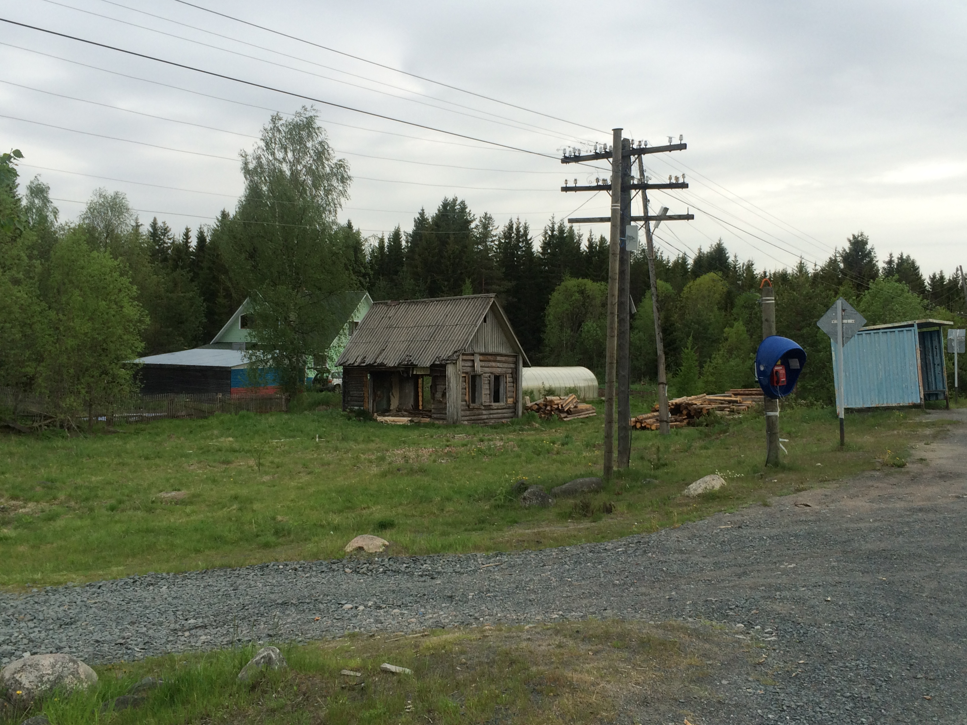 Кутижма (пос.)